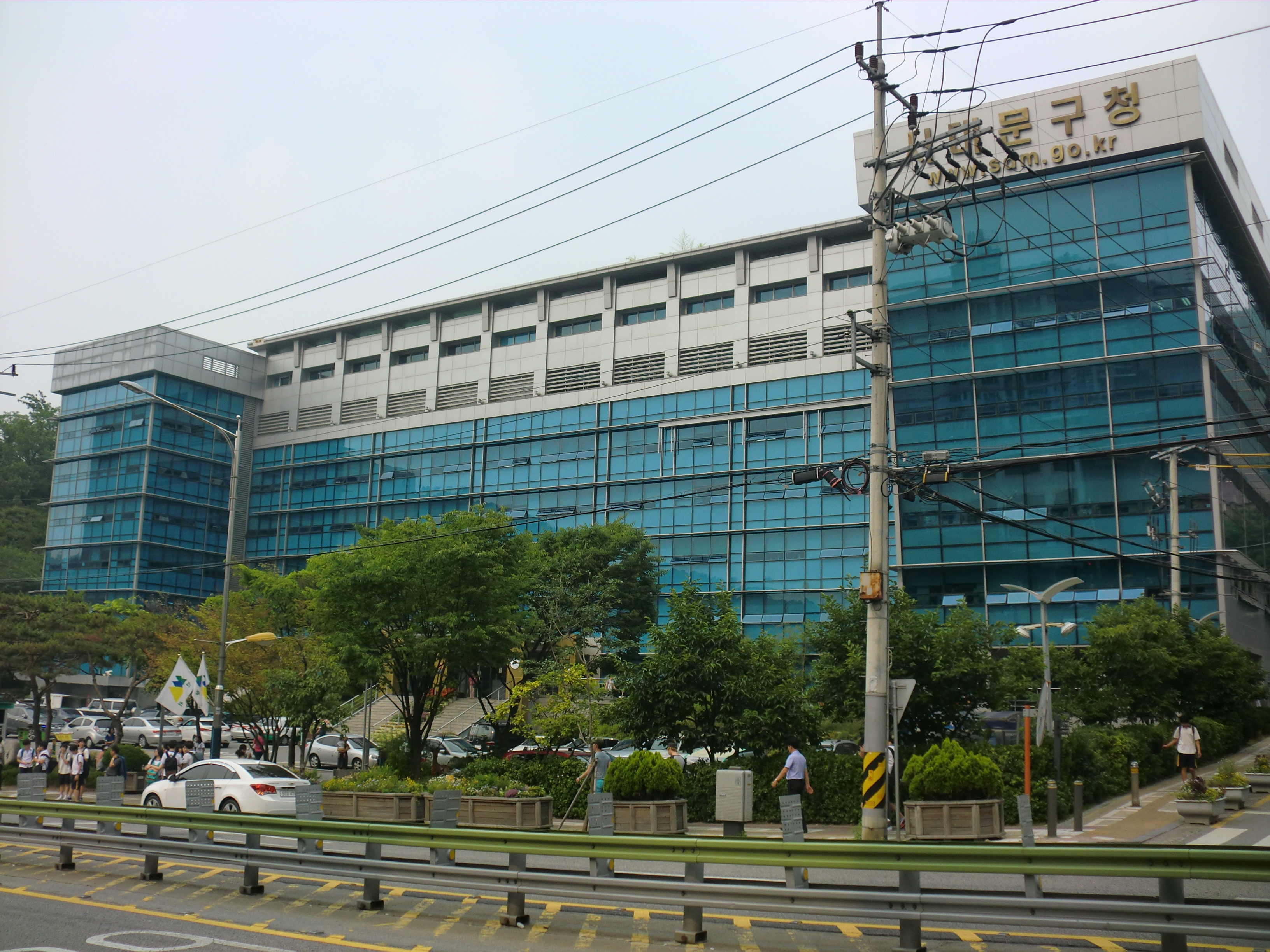 서울특뱔시 서대문구에 있는 서대문구청